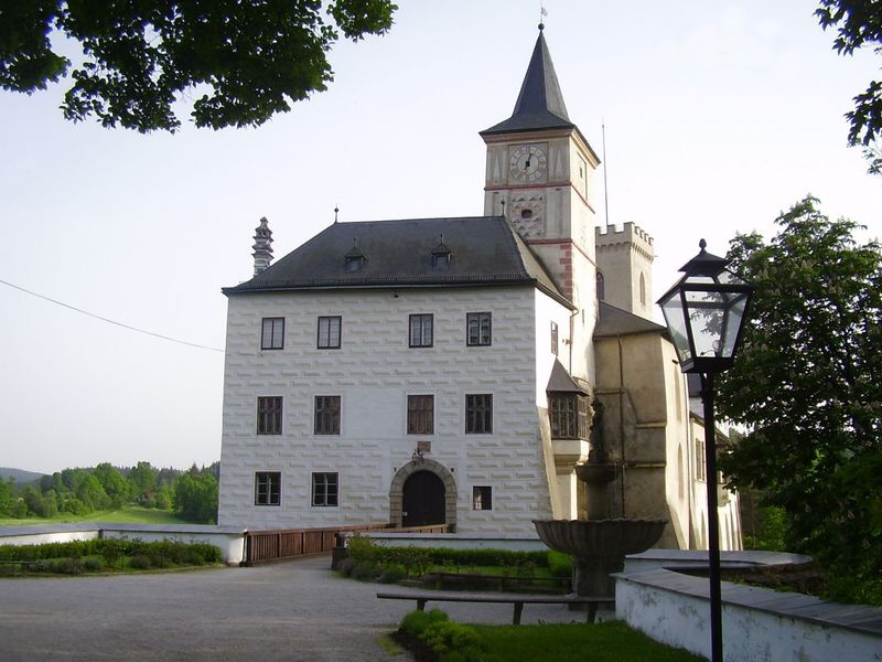 Hrad v Jihočeském kraji, který je znám jako nejstarší sídlo šlechtického rodu Rožmberků